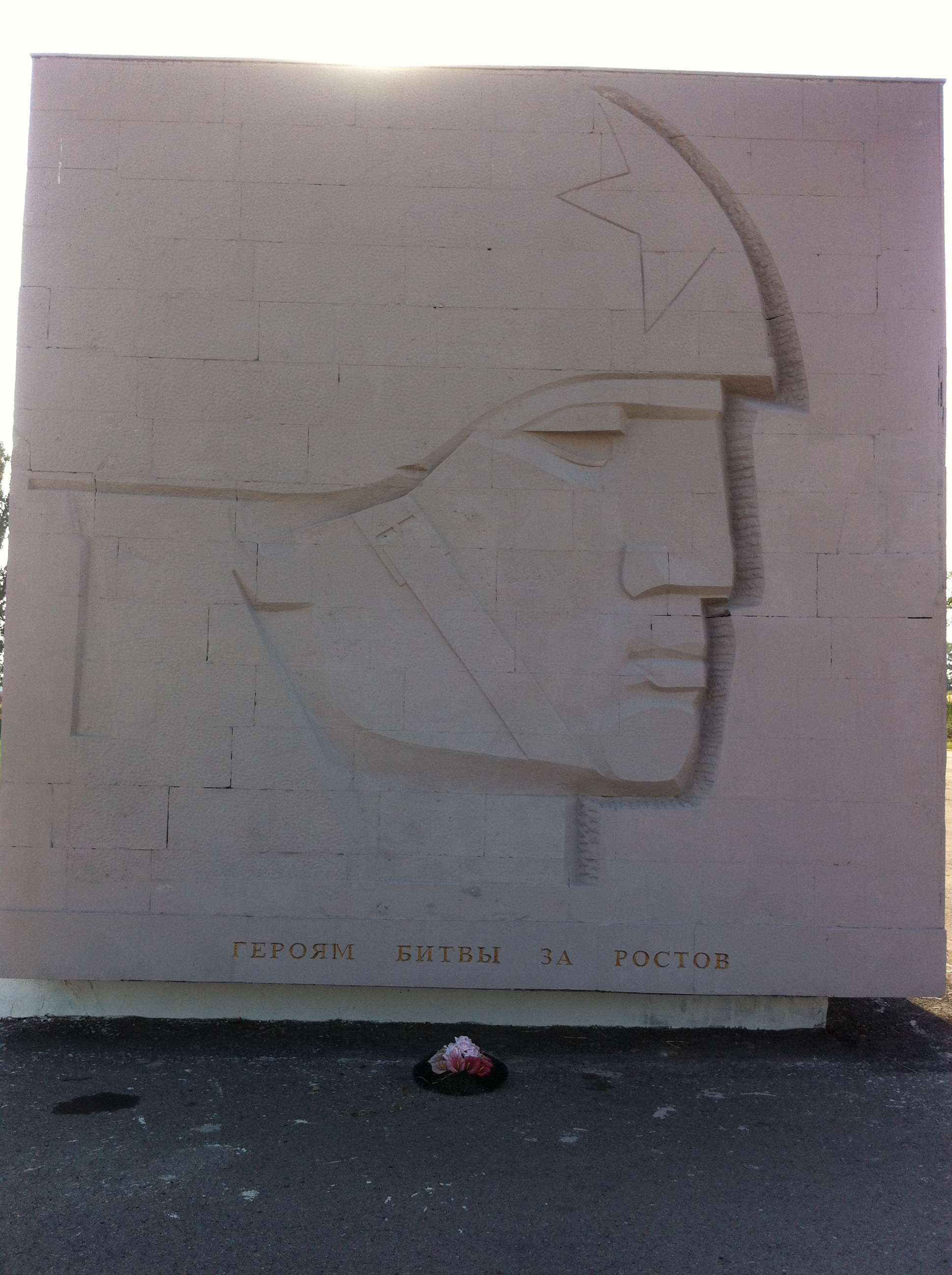 Памятник на артилерийском кургане в честь героев битвы за Ростов-на-Дону в 1941 г.: Большие Салы, Мясниковский район, Ростовская область